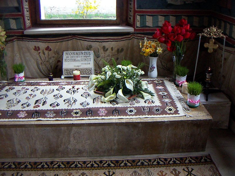 Le sépulcre du Saint Nicodeme de Tismana